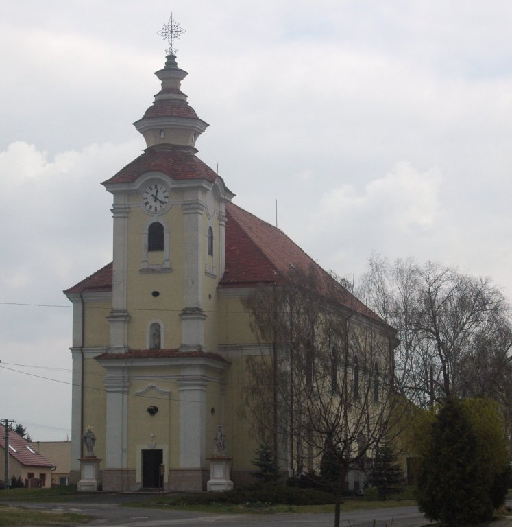 Moravský Svätý Ján, John the Baptist church